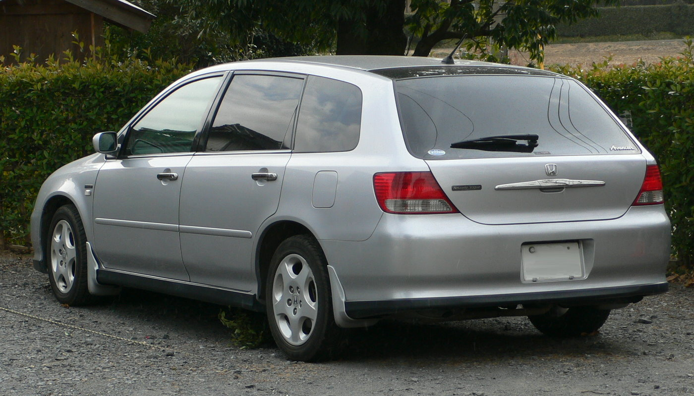 Honda Avancier (Nouvelle Vague)(2001 - 2003)